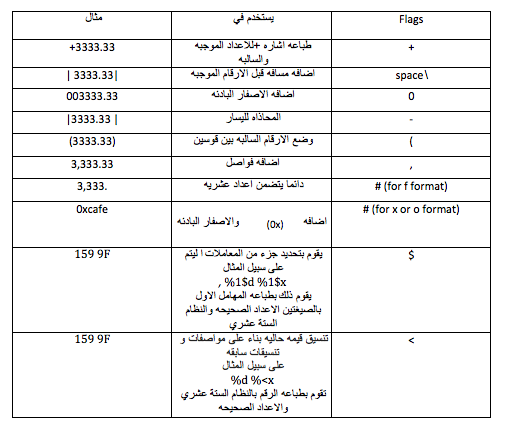 الجدول الثاني